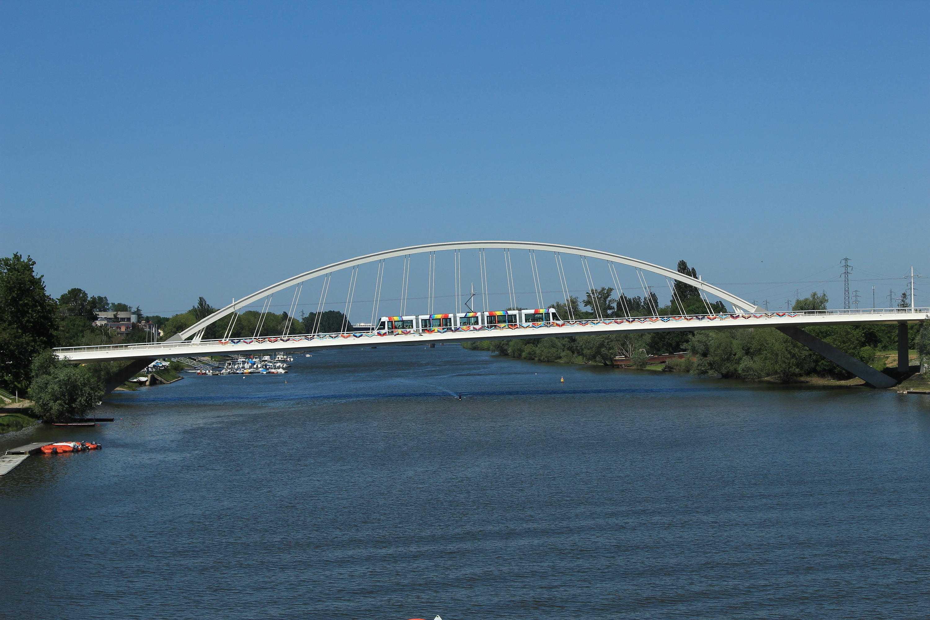 Pont Confluences à Angers, créé pour le tramway dont on voit une rame en plein milieu.